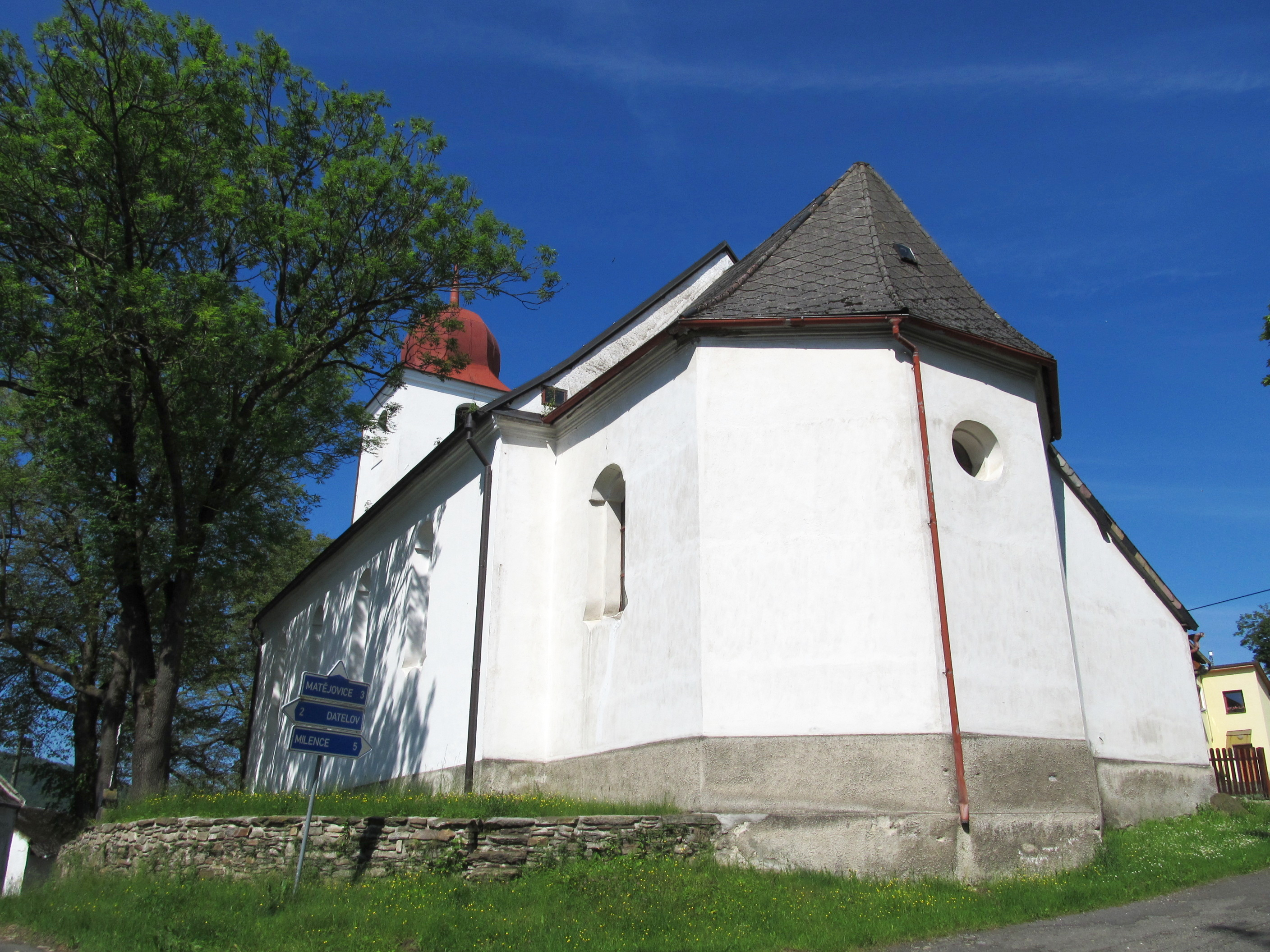 Kostel svatého Isidora